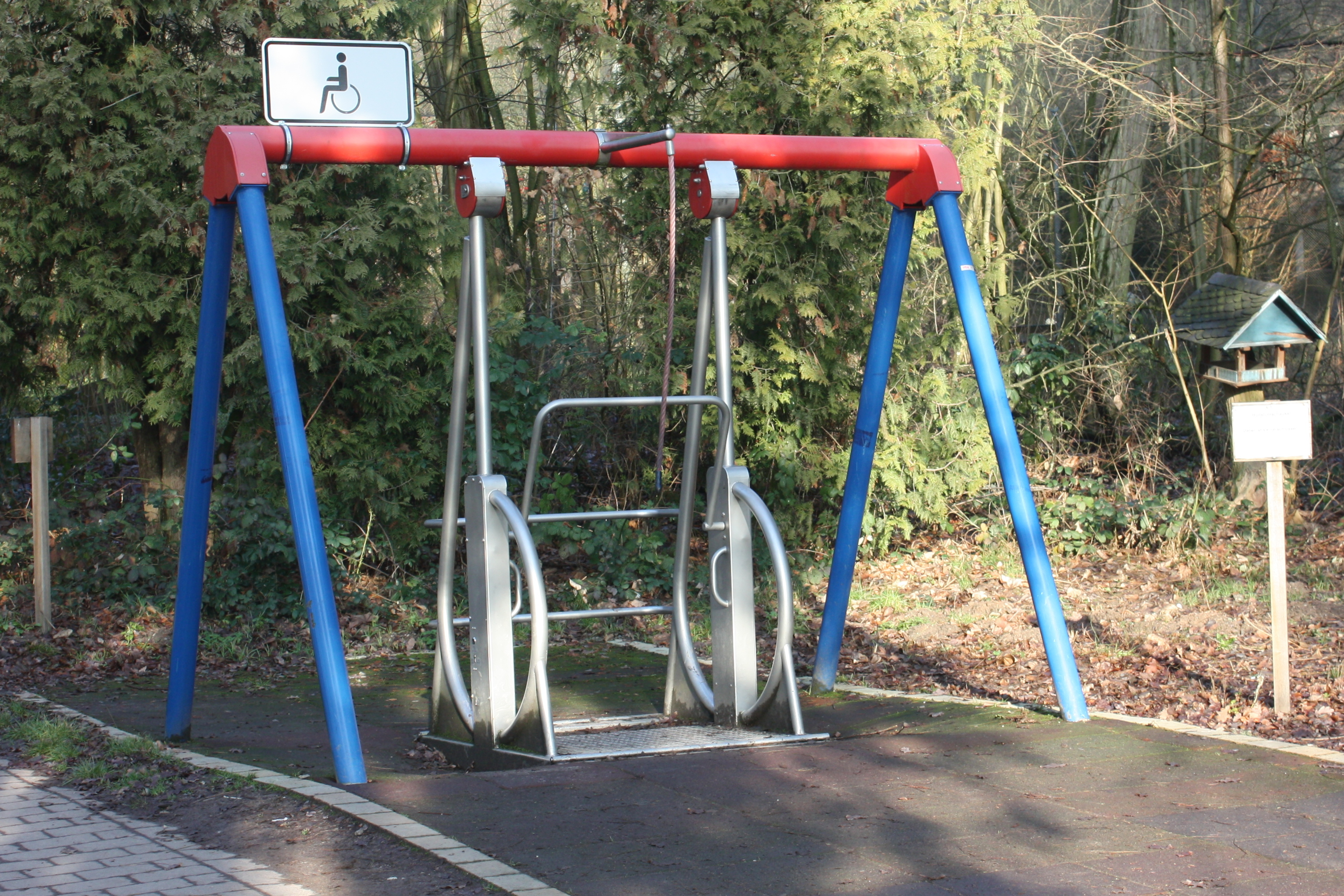 Wiesbaden: Rollstuhlschaukel im Tierpark Fasanierie